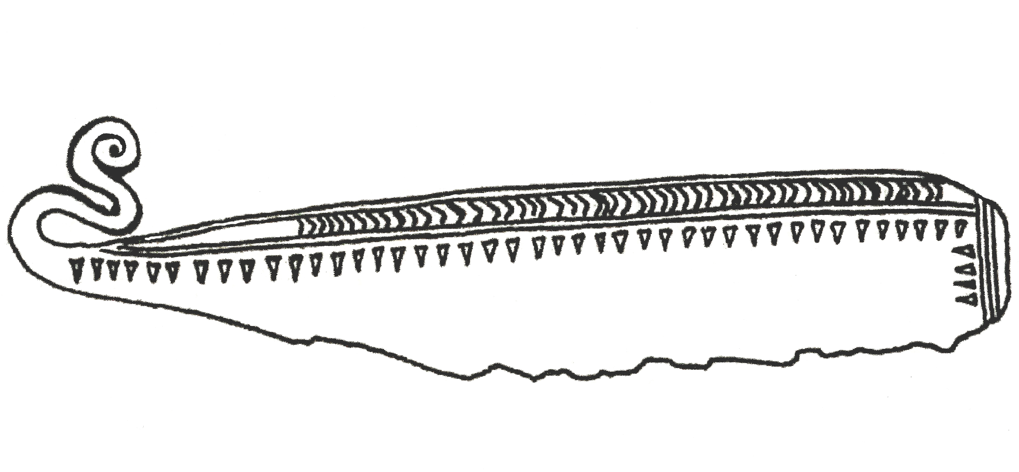 Mit Filzstift und Photoshop überarbeiteter schlechter Druck einer schlechten, ungenauen, alten Zeichnung von 1958 (oder älter). Vorlage: Alter Druck. Die Spirallinie am Griff habe ich etwas verlängert nach einem gleichen Modell. Gleiches Modell: Modell. Fundort: Hamburg-Langenhorn, Hohe Liedt. Der Fund wurde im Museum für Hamburgische Geschichte abgegeben und müsste sich seit 1972 im Archäologischen Museum Hamburg befinden. Da ich das Originalmesser nicht kenne, habe ich die Zeichnung nur wenig verbessert.